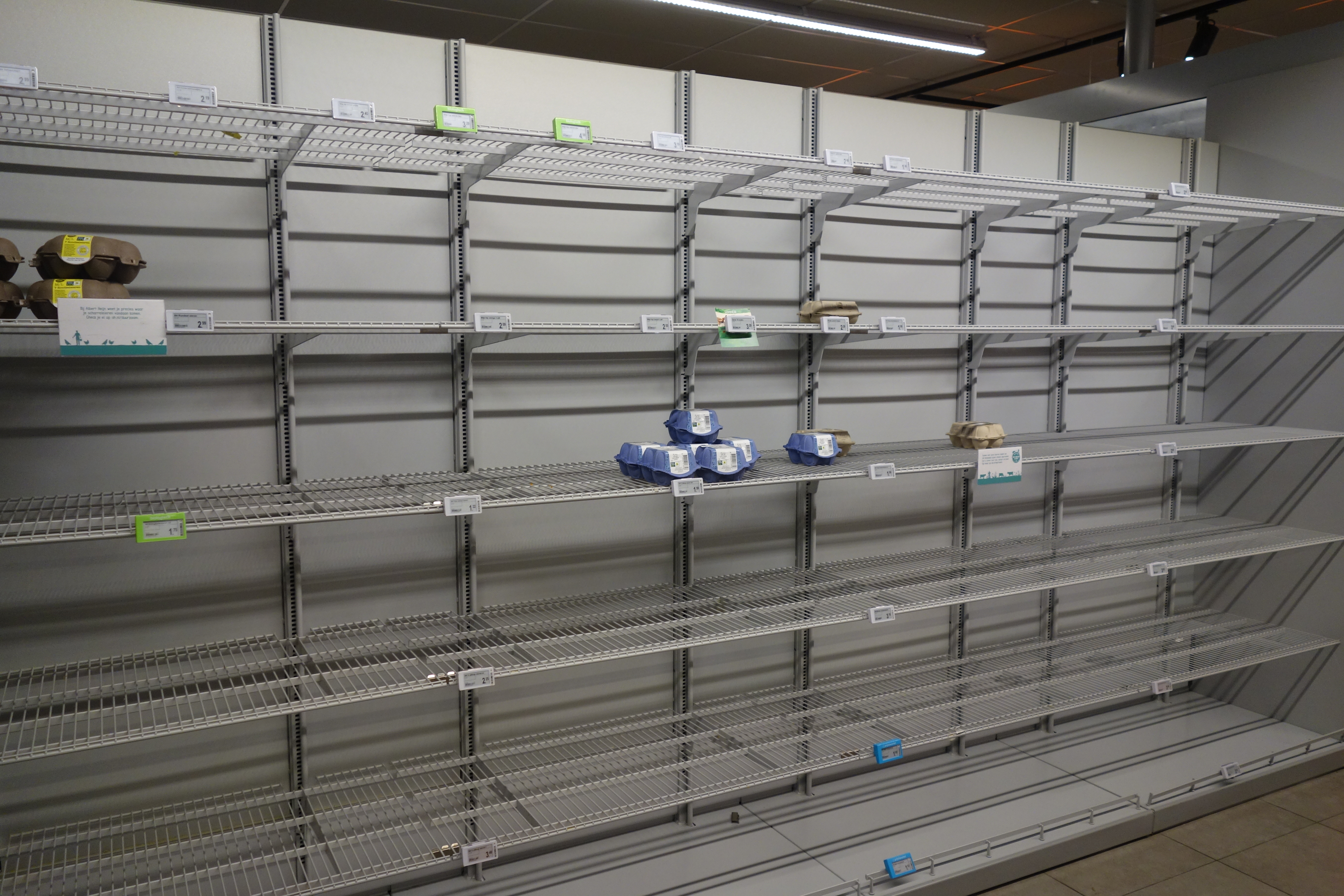 Effecten van hamsteren: lege schappen bij Albert Heijn XL Leiden